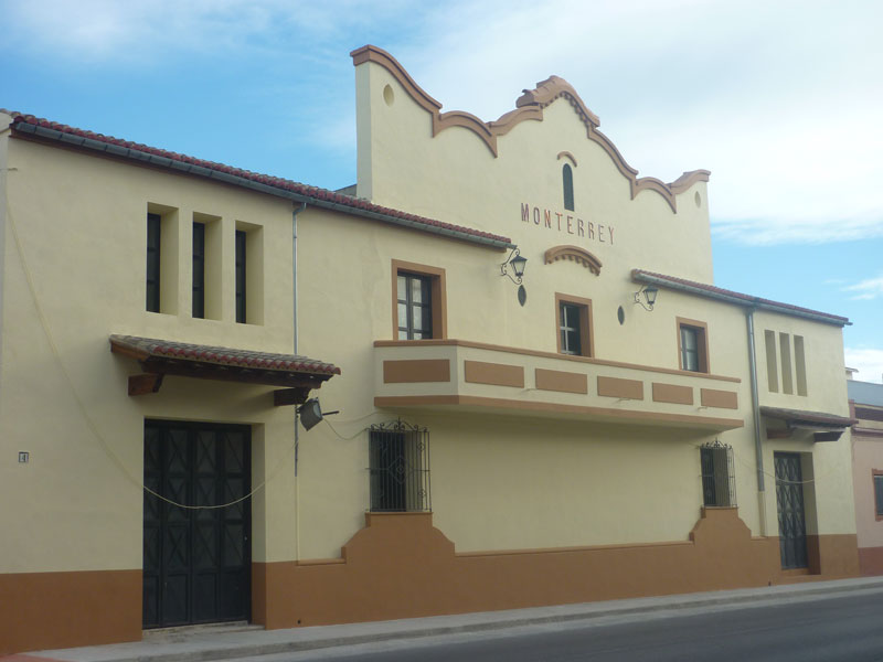 Cine Monterrey en la avinguda de Valéncia número 4 de La Pobla Llarga (Valéncia). obra de l'arquitecte valencià Joan Guardiola, (ca. 1950).